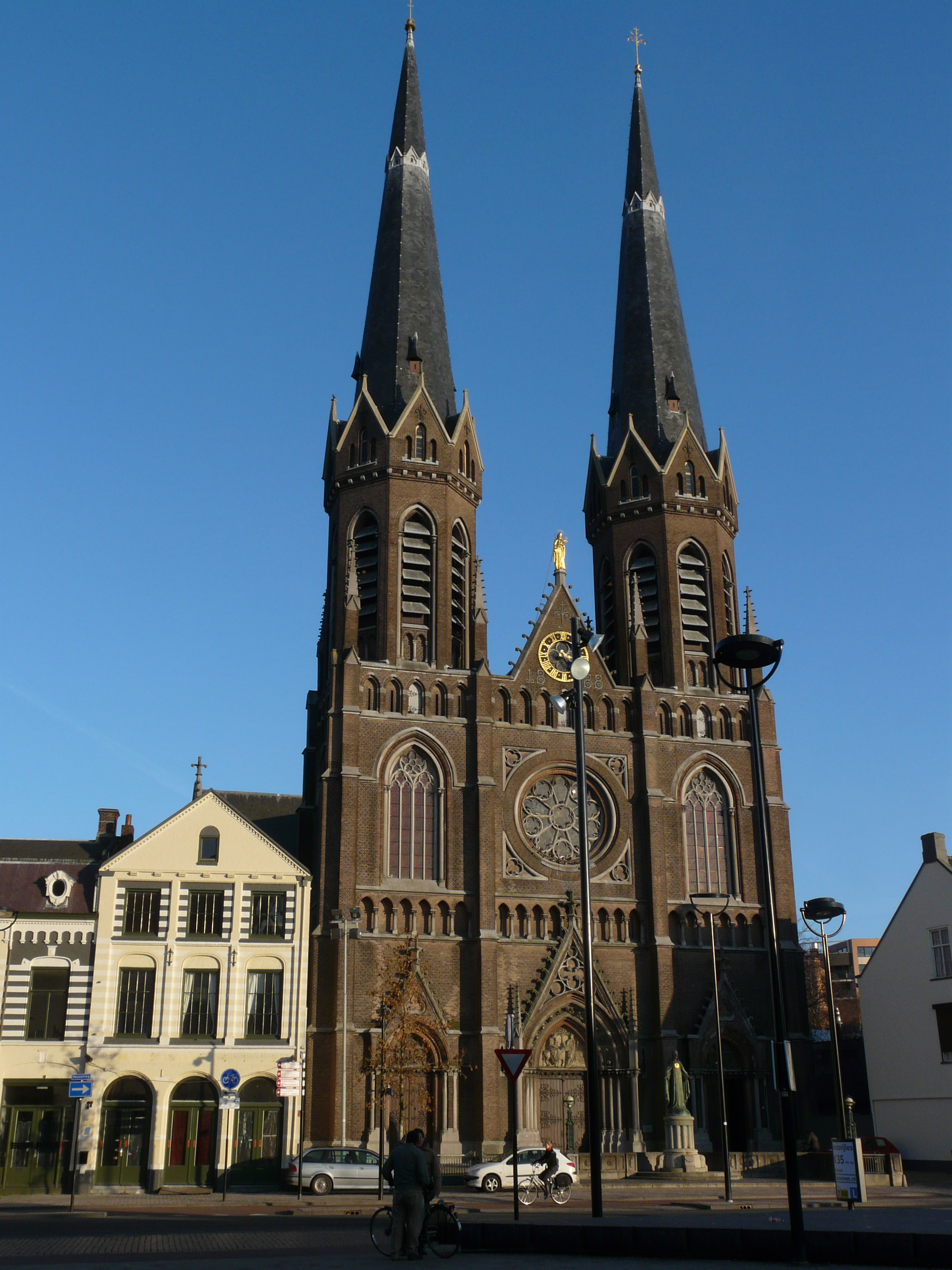 Heuvelse kerk in Tilburg